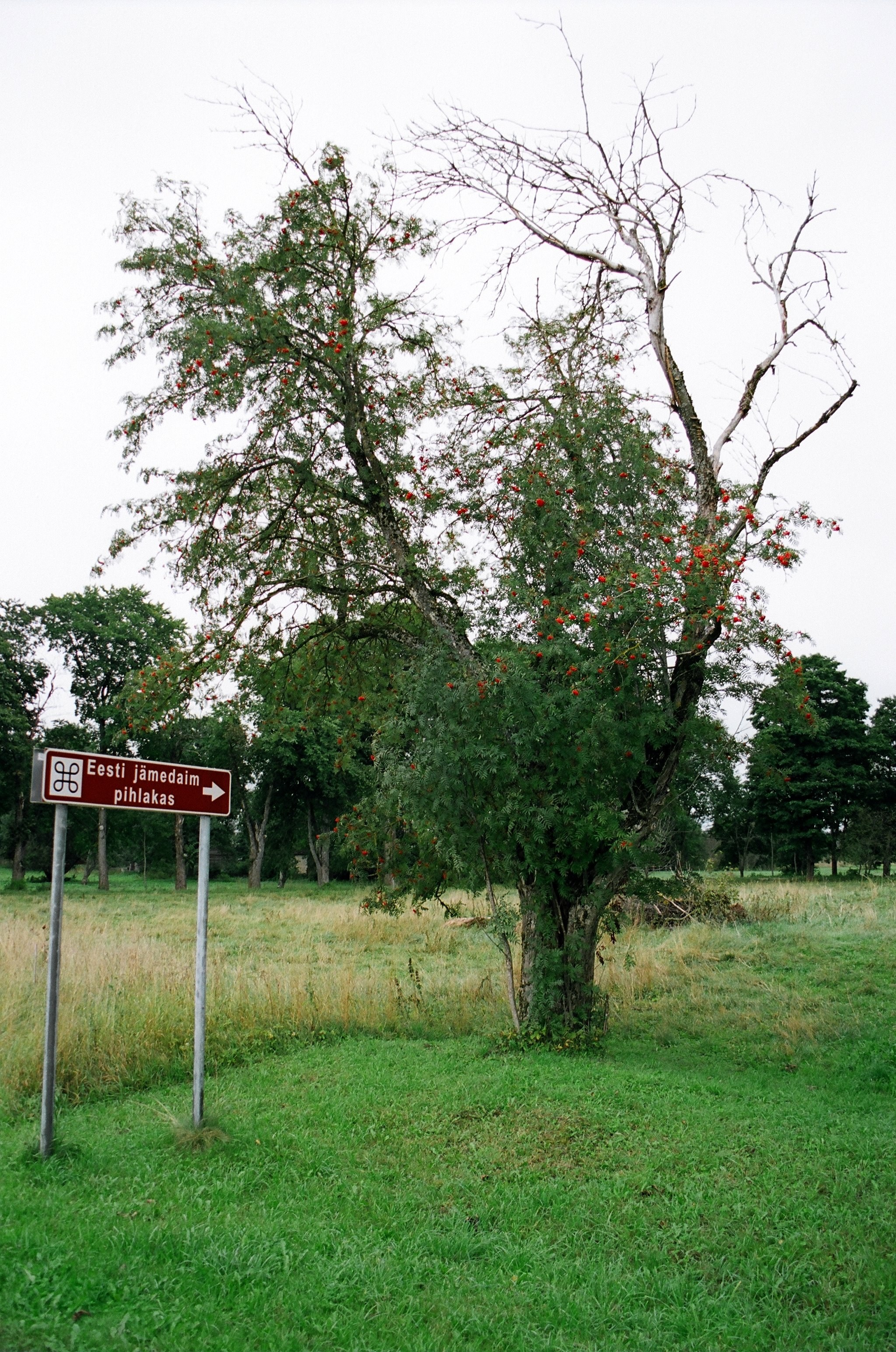 Eesti jämedaim pihlakas, Lääne-Virumaal, Tamsalu vallas, 2005